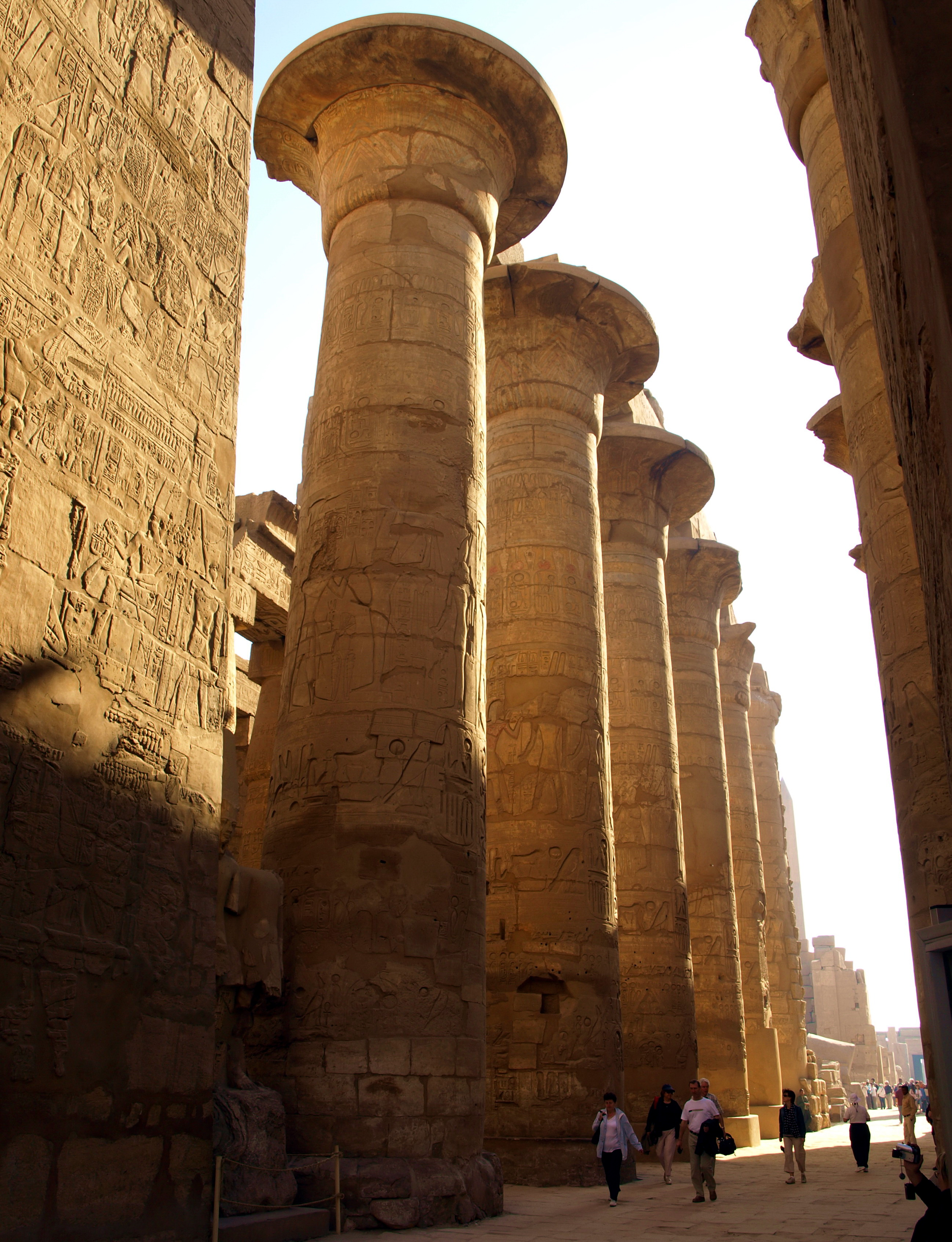 Hypostyle Hall, Karnak